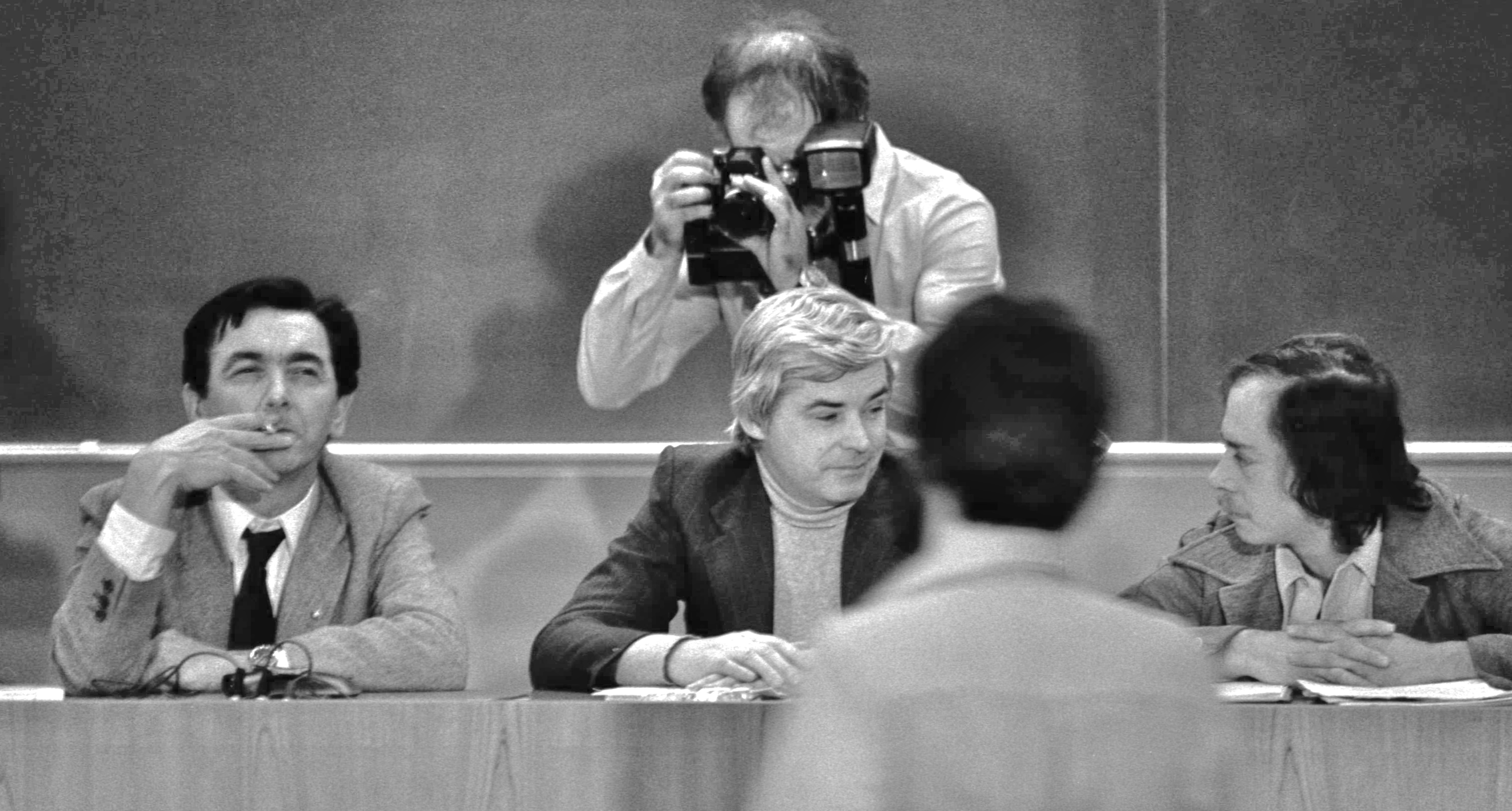 De gauche à droite : Camille Laurin, ministre de l'Éducation, Robert Gaulin, président de la Centrale de l'enseignement du Québec, et Jean-Pierre Charbonneau, député. En 1981, lors d'un colloque organisé par les associations d'étudiants universitaires du Québec.